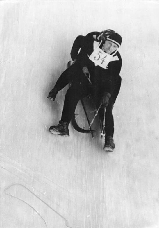 Zentralbild Wlocka-Schaar 8.2.1954-Rodelmeisterschaften der Deutschen Demokratischen Republik vom 3.-7.2.1954 in Oberhof-Die Meisterschaften im Gemischten Doppel wurden am 7.2.1954 auf der Wadsberg-Bobbahn ausgetragen. UBz: Westdeutsche Gäste durchfahren die Schaukurve. Albert Krause mit seiner Partnerin Gertrud Engelke, die Sieger in der Gästeklasse im Gemischten Doppel wurden.